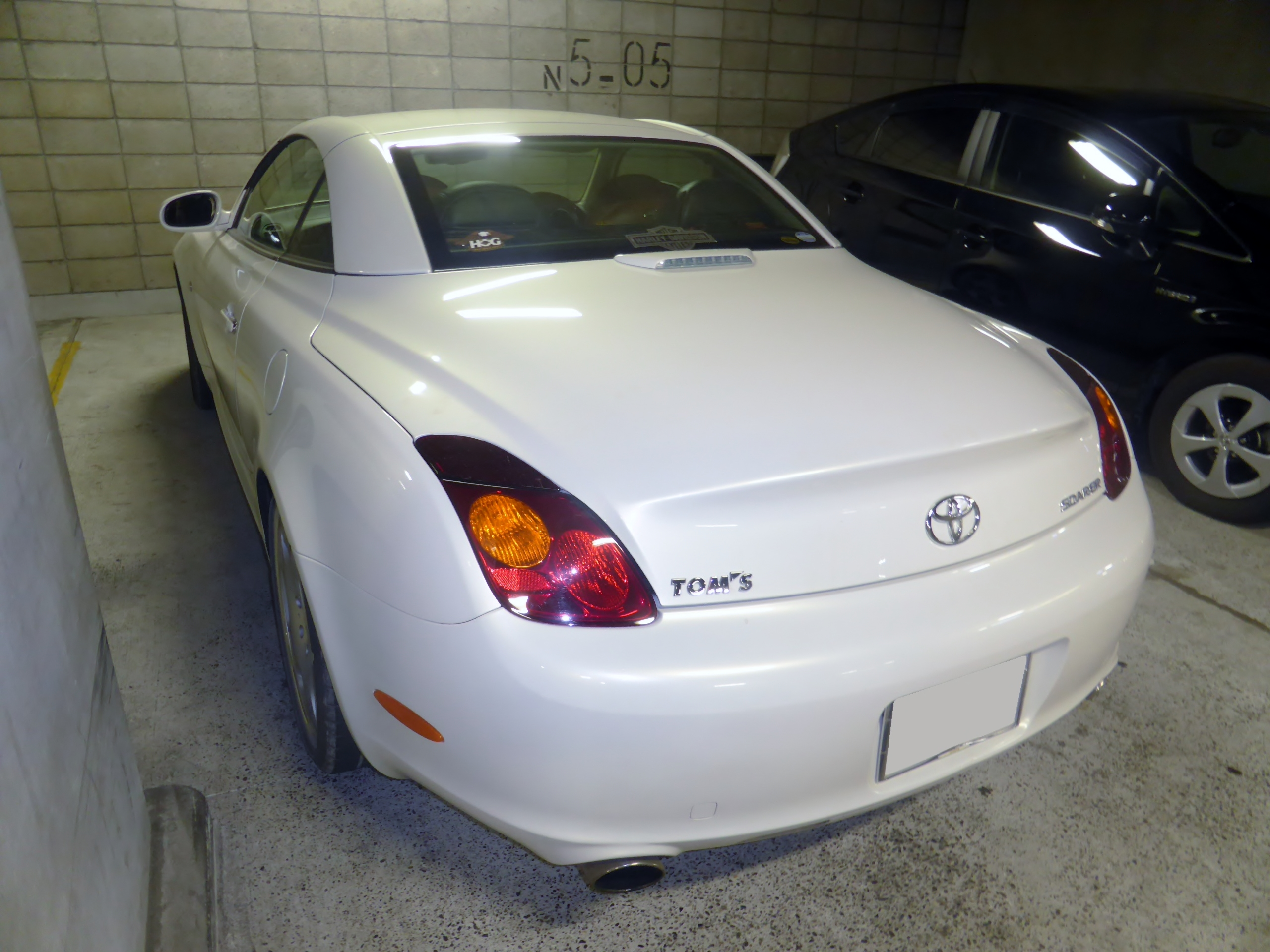 UZZ40型トヨタ・ソアラをリアから撮影。